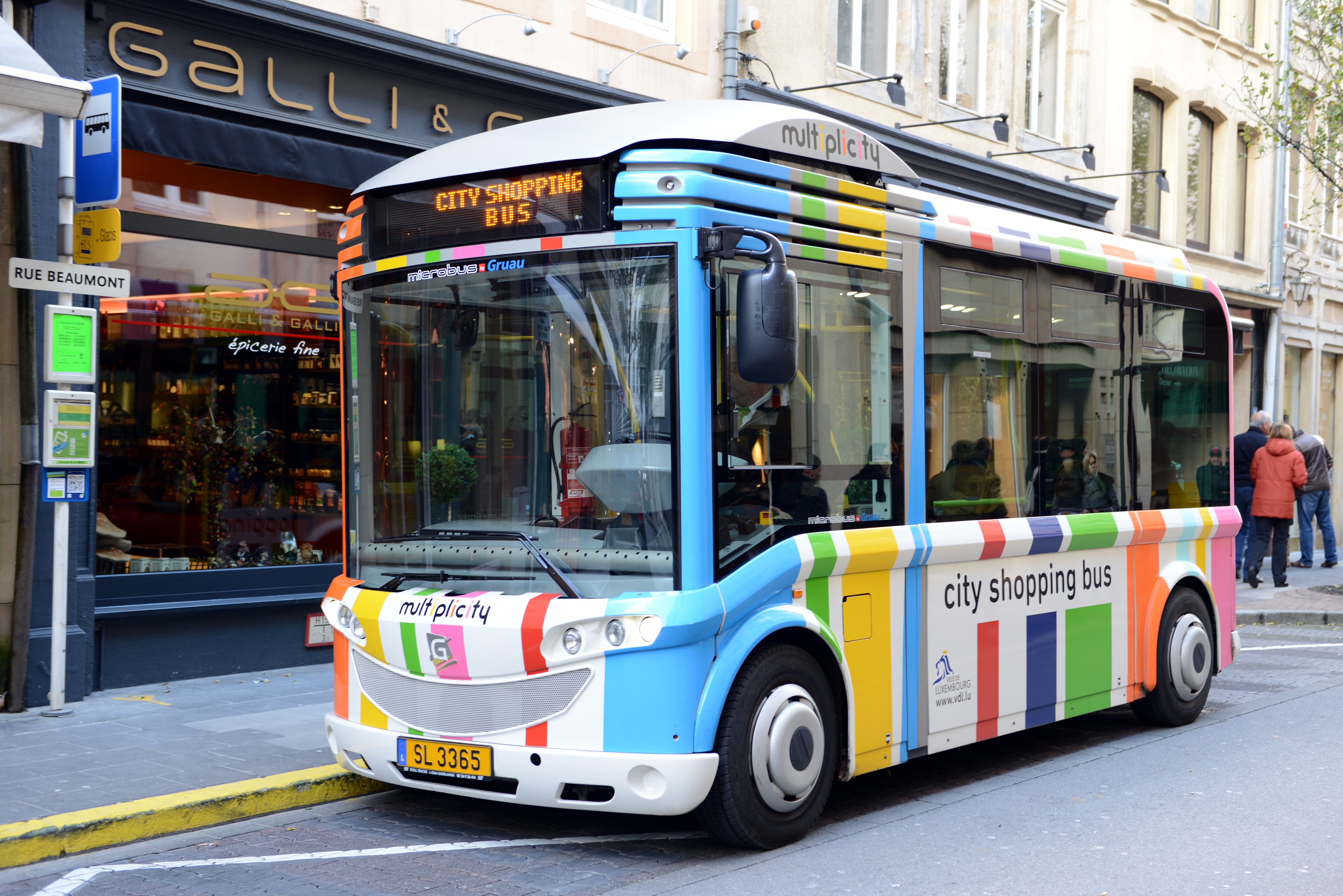 E Stater Bus an der Beaumontsgaass, November 2013.